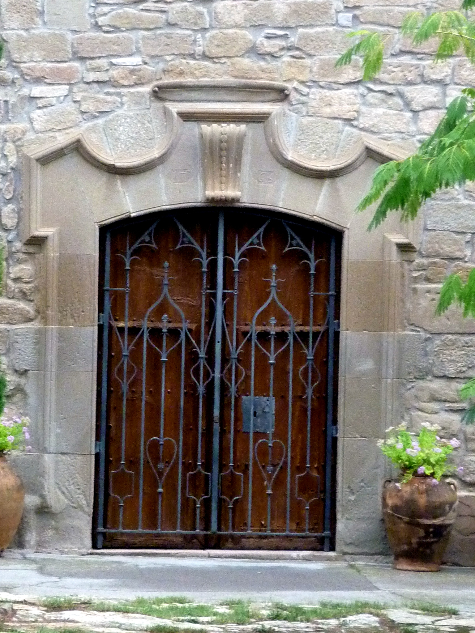 Santuari de la Mare de Déu de Refet (Artesa de Segre): portal